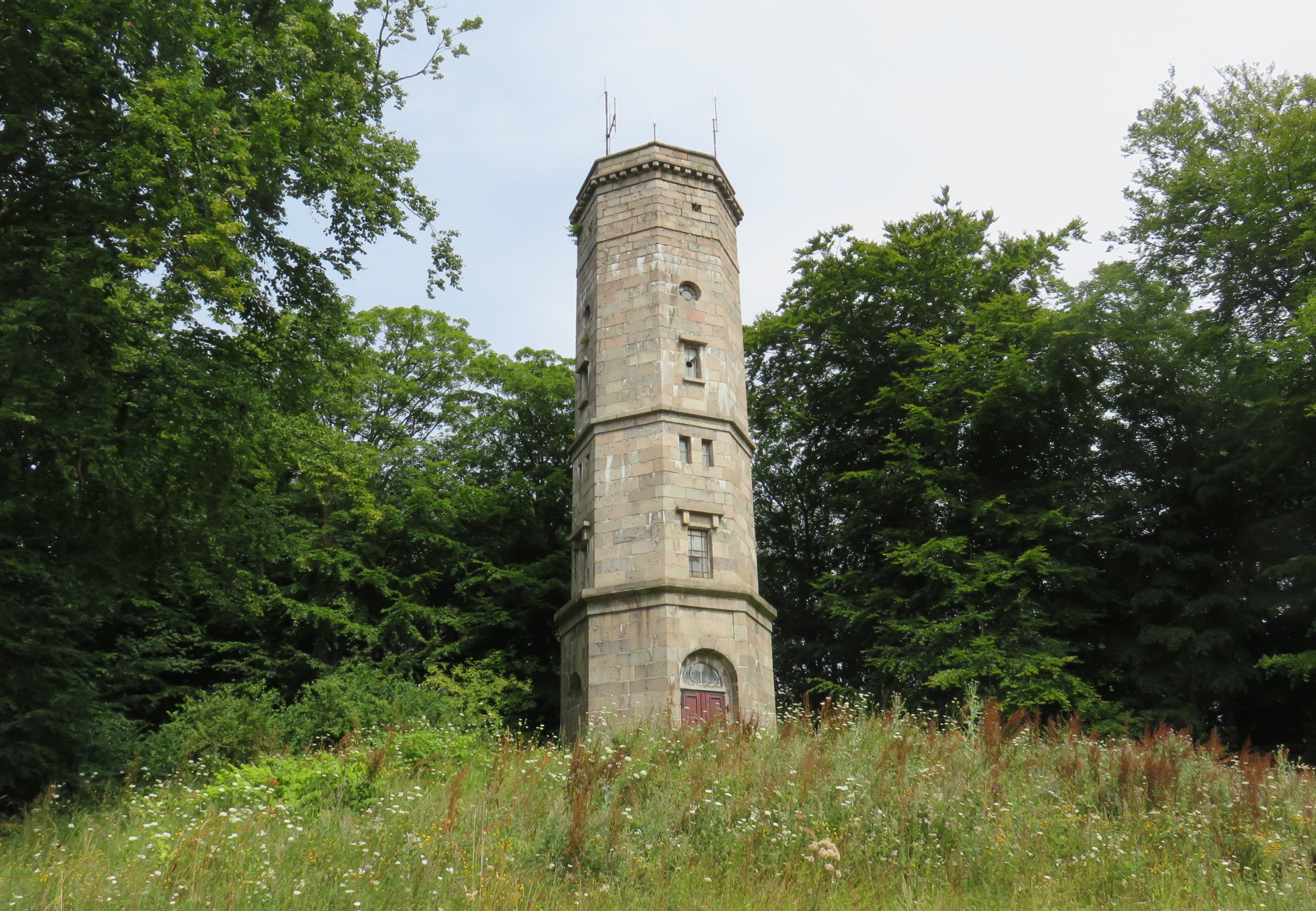 Der Elisabethturm auf dem Bungsberg, gesehen vom Parkplatz